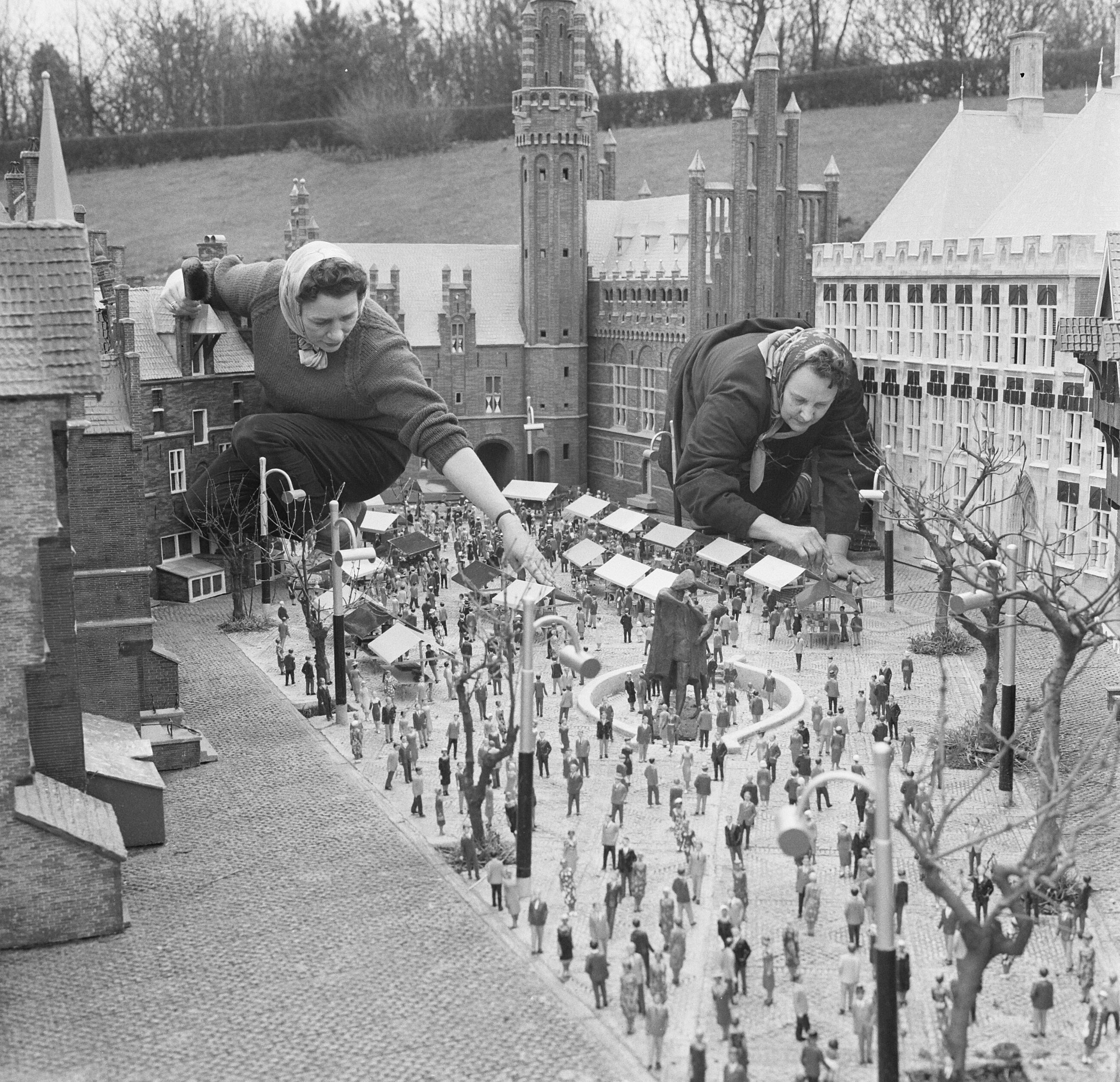 Collectie / Archief : Fotocollectie Anefo Reportage / Serie : [ onbekend ] Beschrijving : Madurodam bereidt zich voor, voor touristenstroom, report diverse werkzaamheden Datum : 23 maart 1964 Locatie : Den Haag, Zuid-Holland Trefwoorden : miniaturen Instellingsnaam : Madurodam Fotograaf : Koch, Eric / Anefo Auteursrechthebbende : Nationaal Archief Materiaalsoort : Negatief (zwart/wit) Nummer archiefinventaris : bekijk toegang 2.24.01.03 Bestanddeelnummer : 916-2139